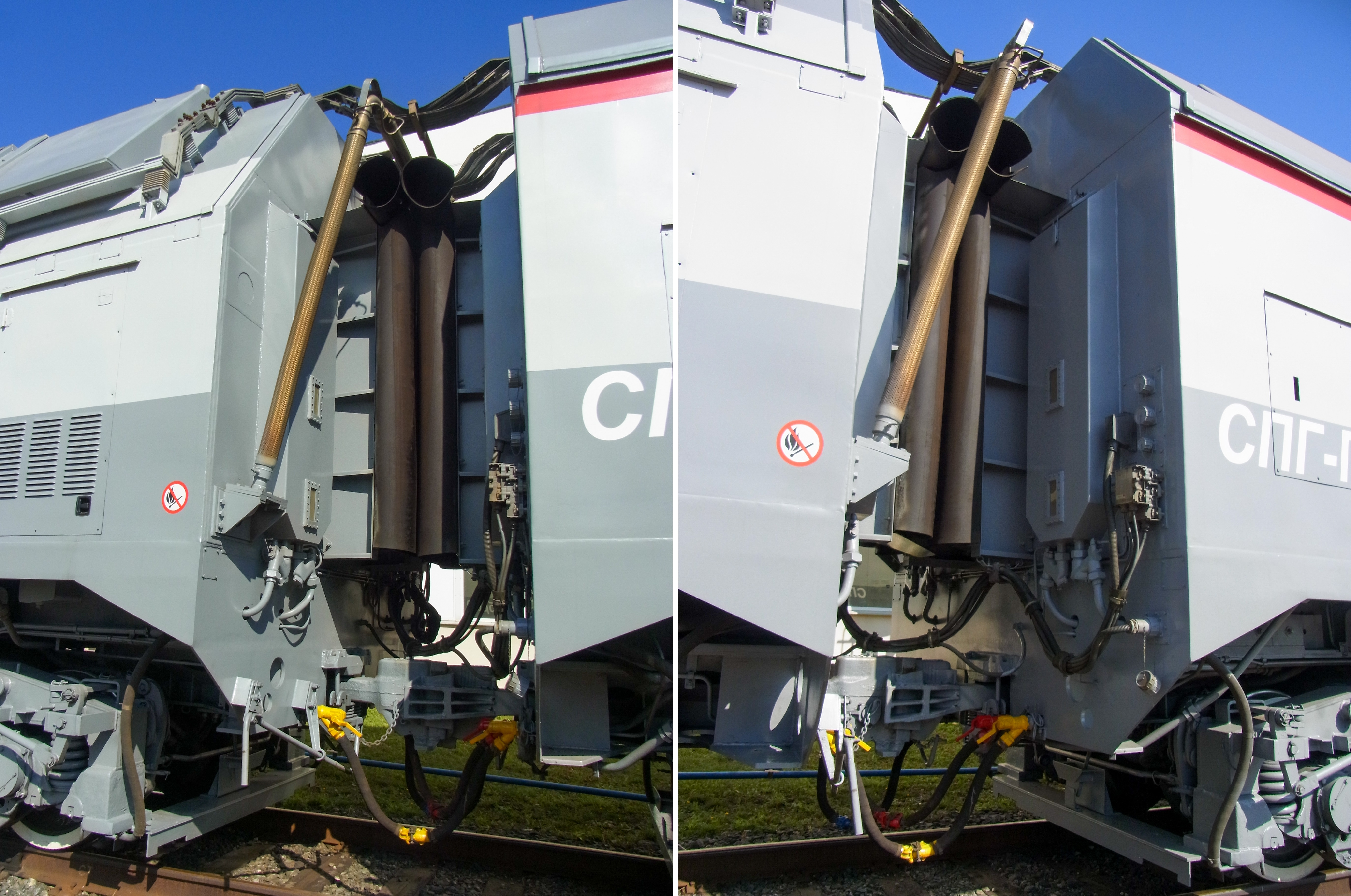 Межсекционный переход газотурбовоза ГТ1h-002